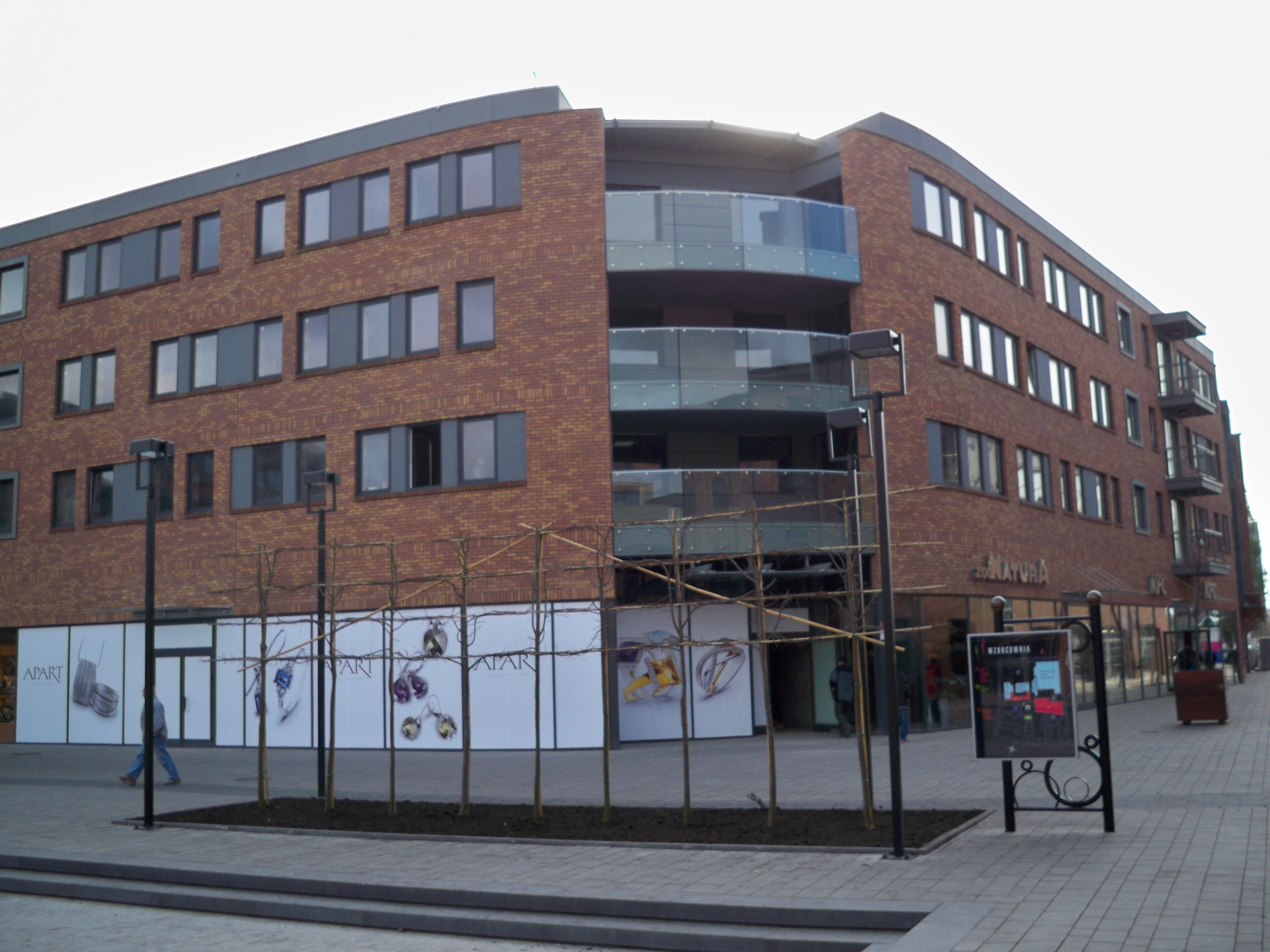 Wzorcownia Włocławek 2009 r.